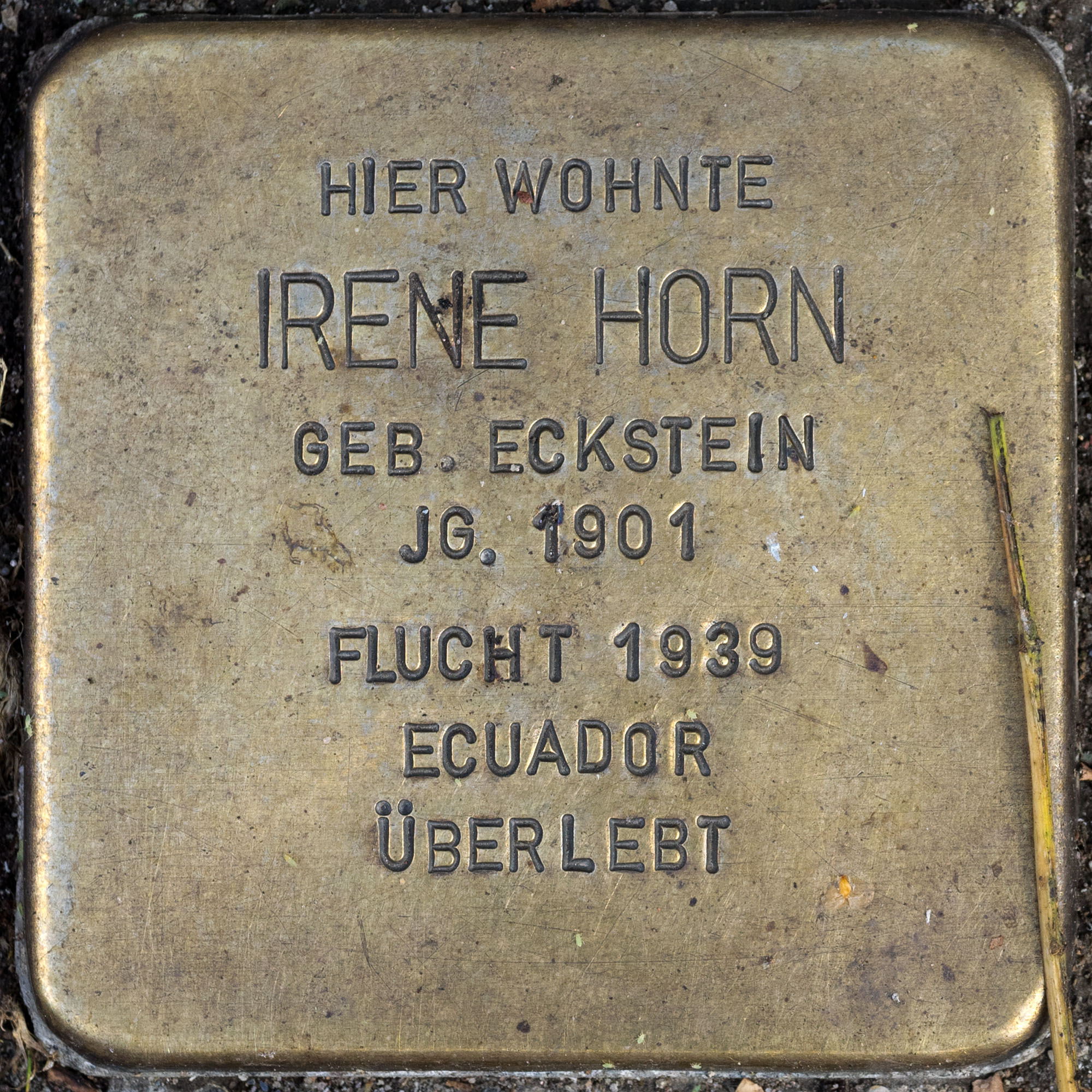 2016 Stolpersteine ToeVo Horn Irene